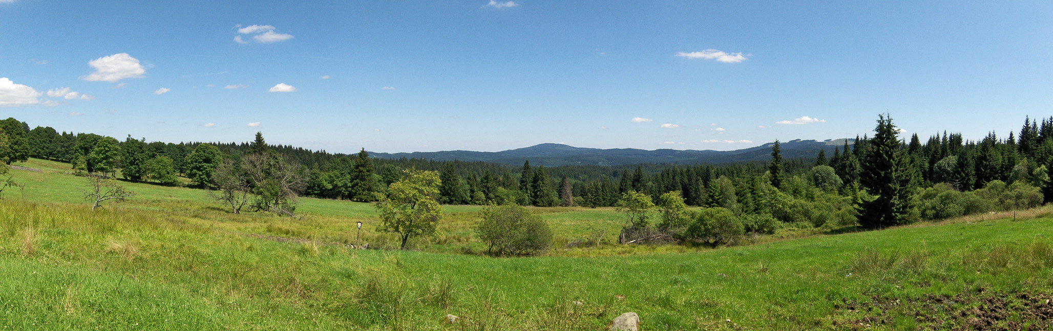 Horní Sněžná, východní panorama